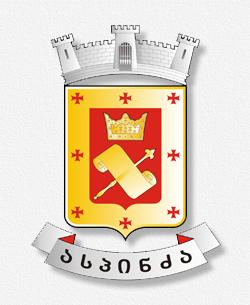 ასპინძის მუნიციპალიტეტის გერბი